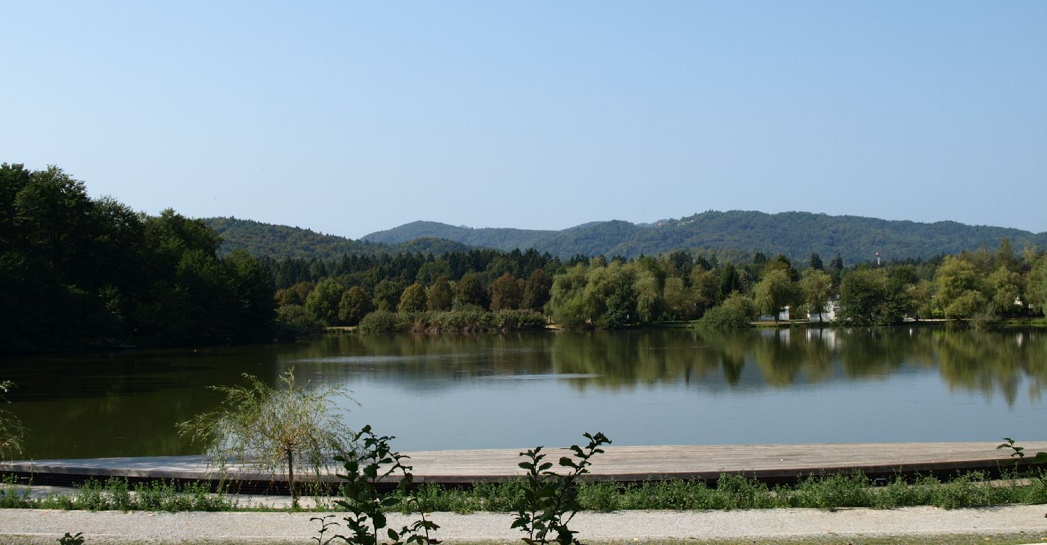 Manjše jezero oz. bajer v ljubljanski soseski Mostec.